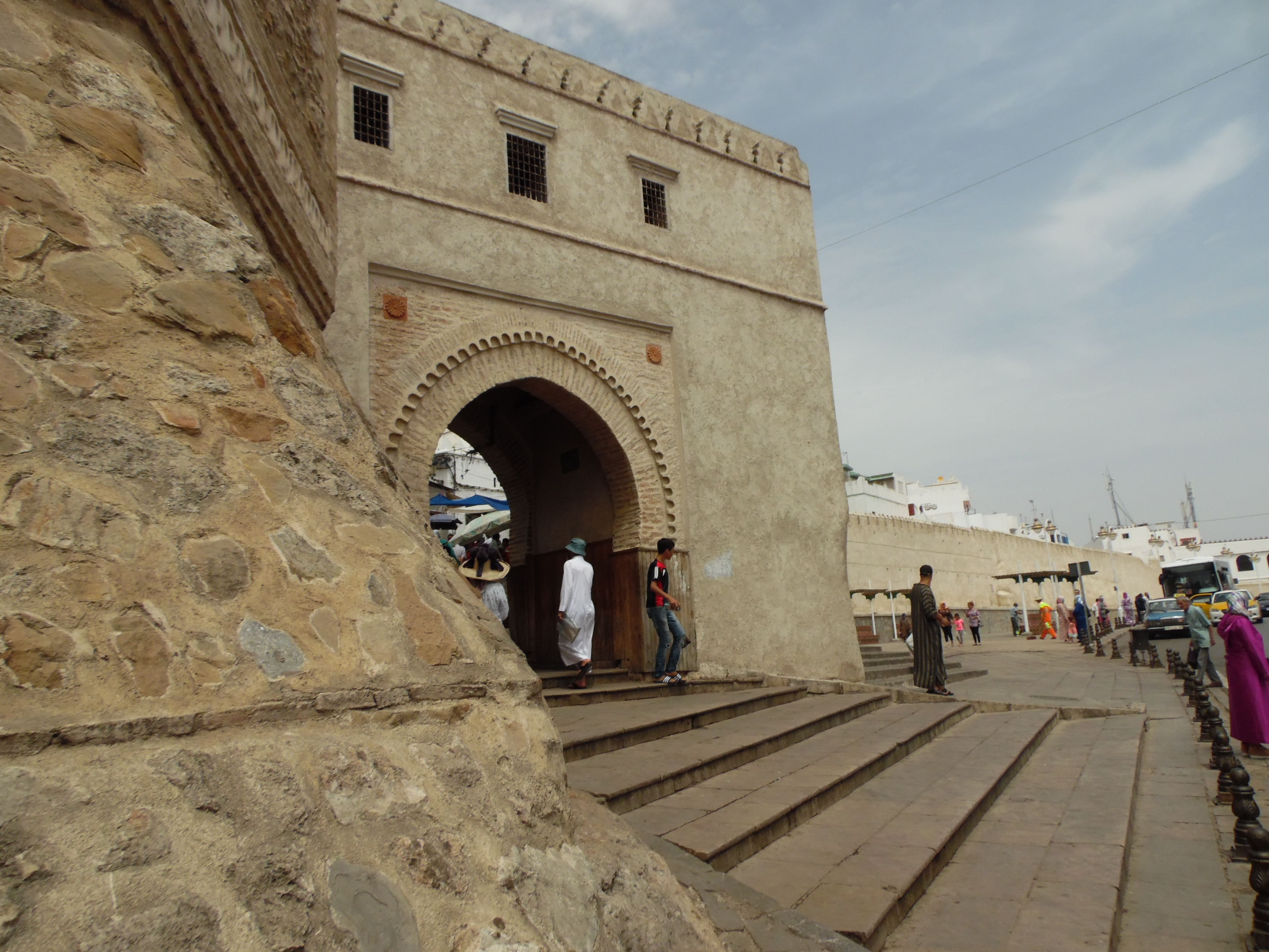 Vista de Bab El Ucla, verano 2015